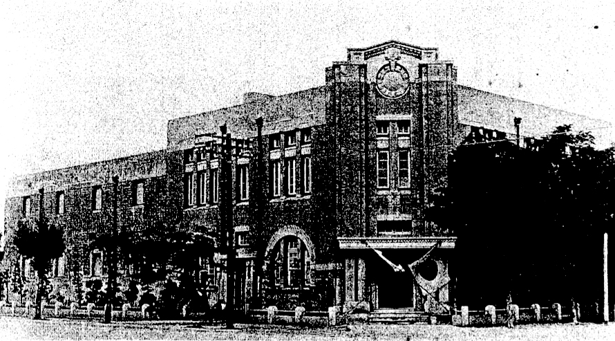 中文（台灣）: 專賣局高雄支局廳舍，位於高雄市堀江町